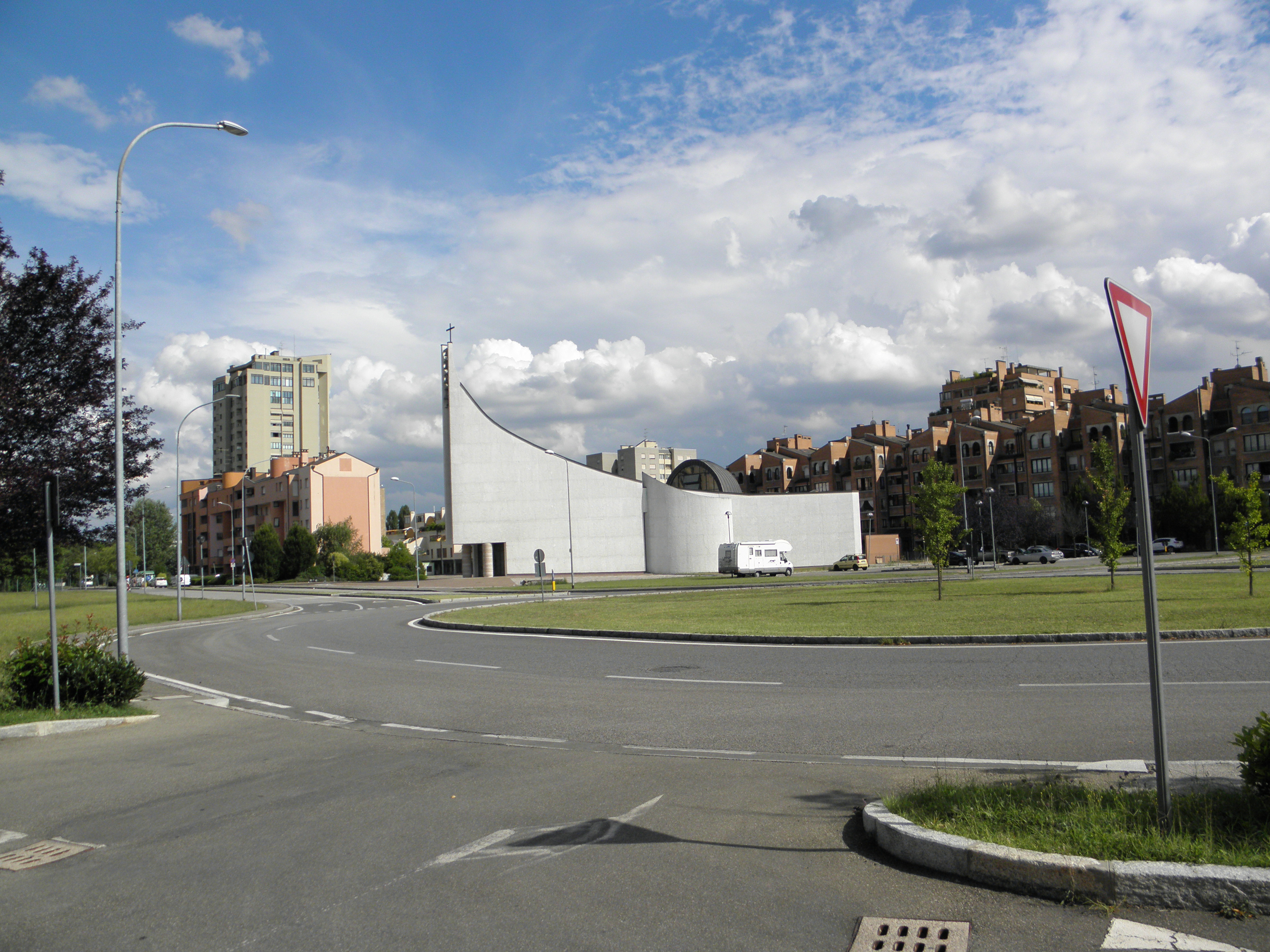 Castel Maggiore, Piazza Amendola con la nuova chiesa parrocchiale di San Bartolomeo di Bondanello.